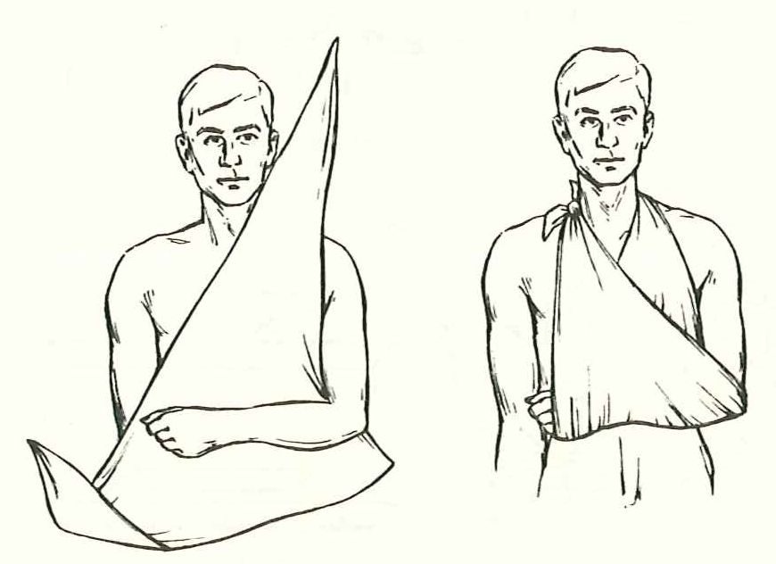 Darstellung von Notverbänden